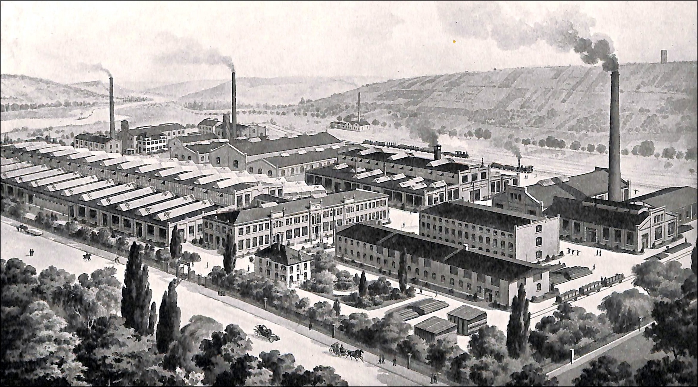 Würzburg (fiktive) Ansicht der Maschinenfabrik Koenig & Bauer - Hersteller von Schnelldruckpressen. Die Werksgründung datiert 1817, die Erben des Firmengründers befassten sich ab 1970 mit der Herstellung von Rotationsdruckmaschinen. Die Firma war im 19. Jahrhundert ein führender Hersteller dieser Spaezialmaschinen (um 1910 waren 8000 Schnellpressen, 1000 Rotationsdruckmaschinen und mehrere Tausend Stereotypie-Apparate) verkauft.